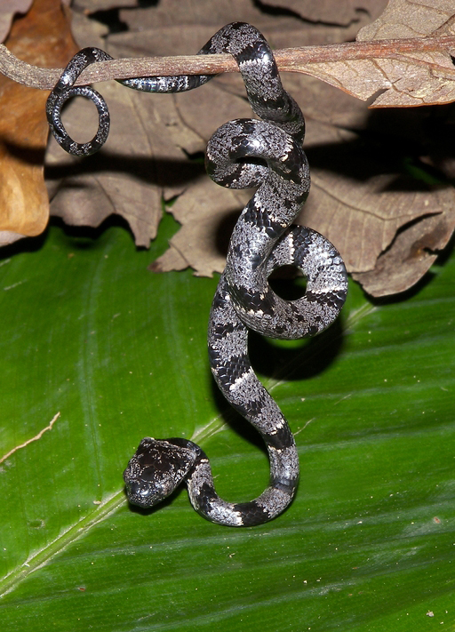 Sibon nebulata